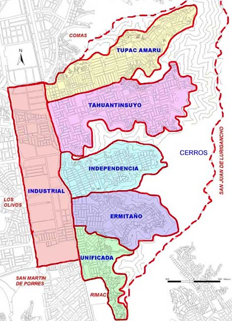 Sectores del Distrito de Independencia (Lima)